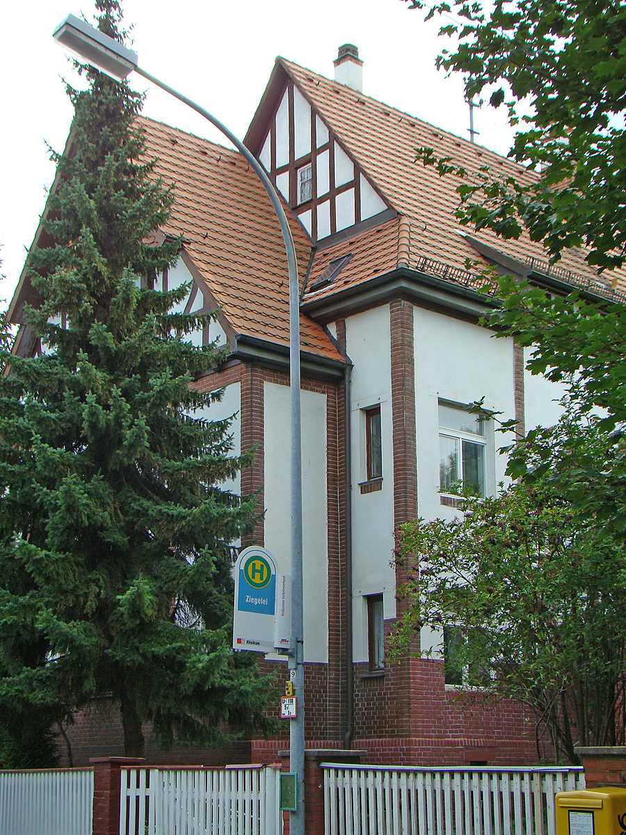 Denkmalgeschütztes Anwesen Böckinger Straße 98 in Heilbronn-Neckargartach